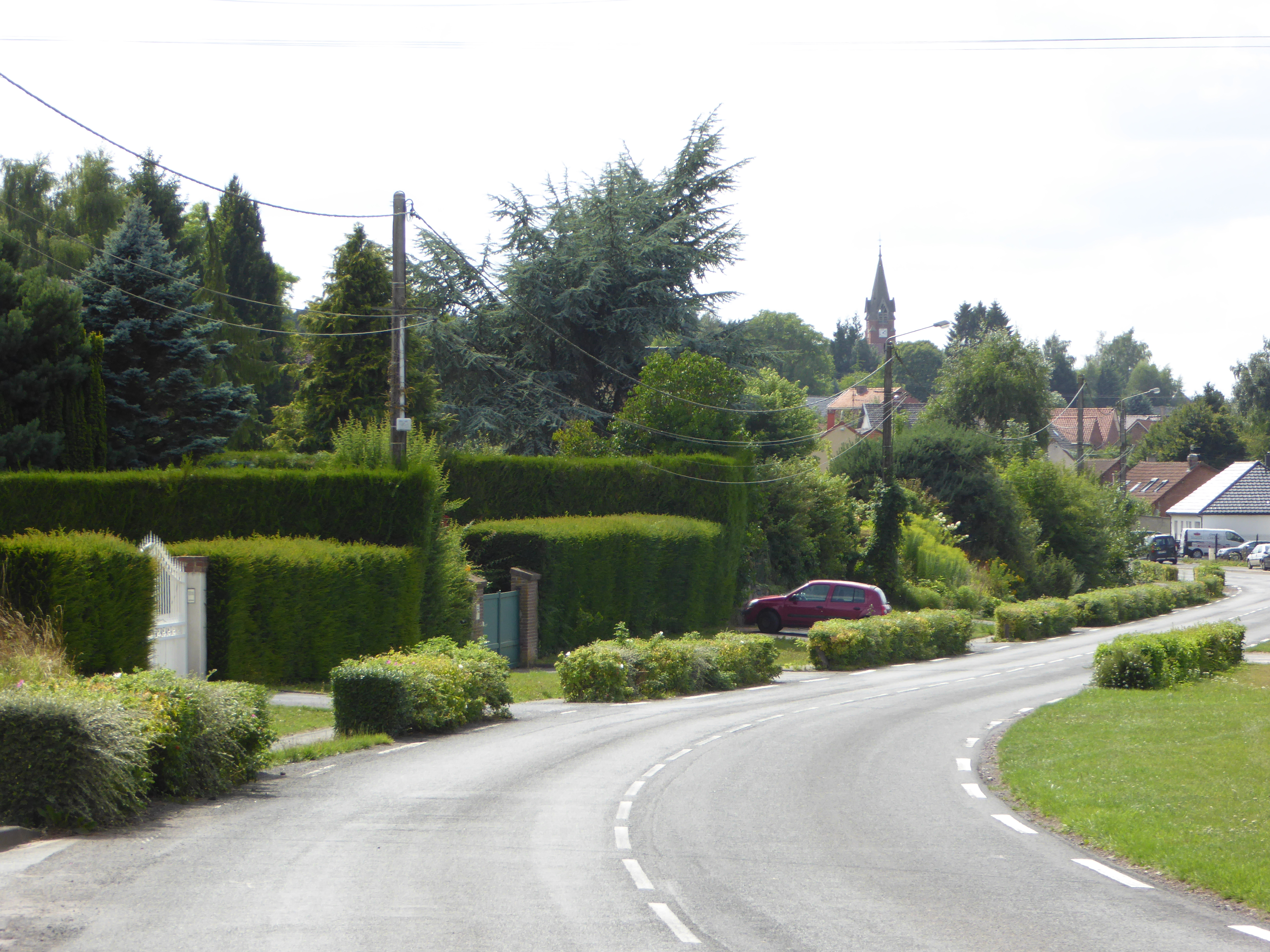 Carency Pas-de-Calais, Hauts-de-France France